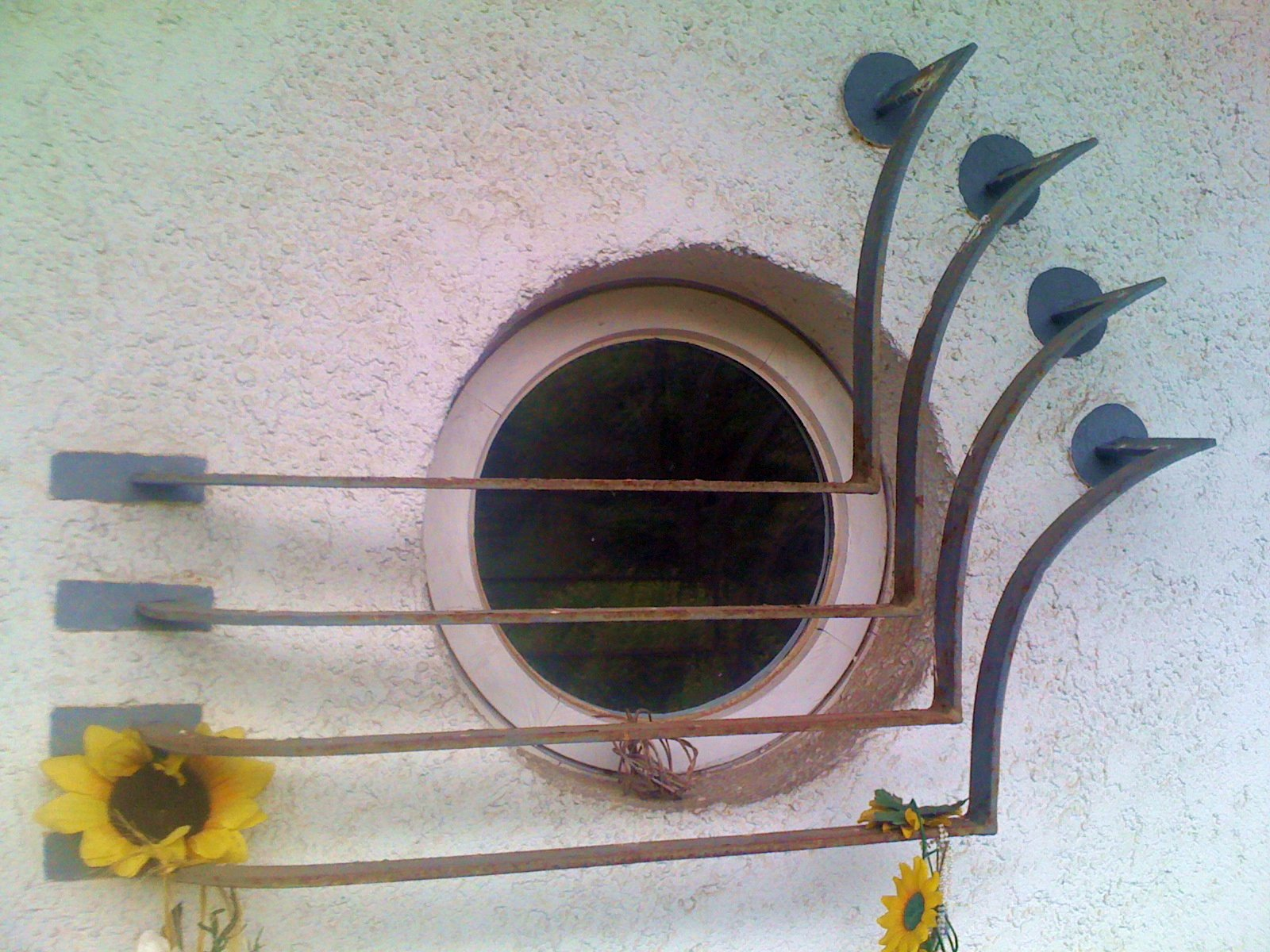 Fenstergitter2 Kinderheilstätte Harzgerode 2011